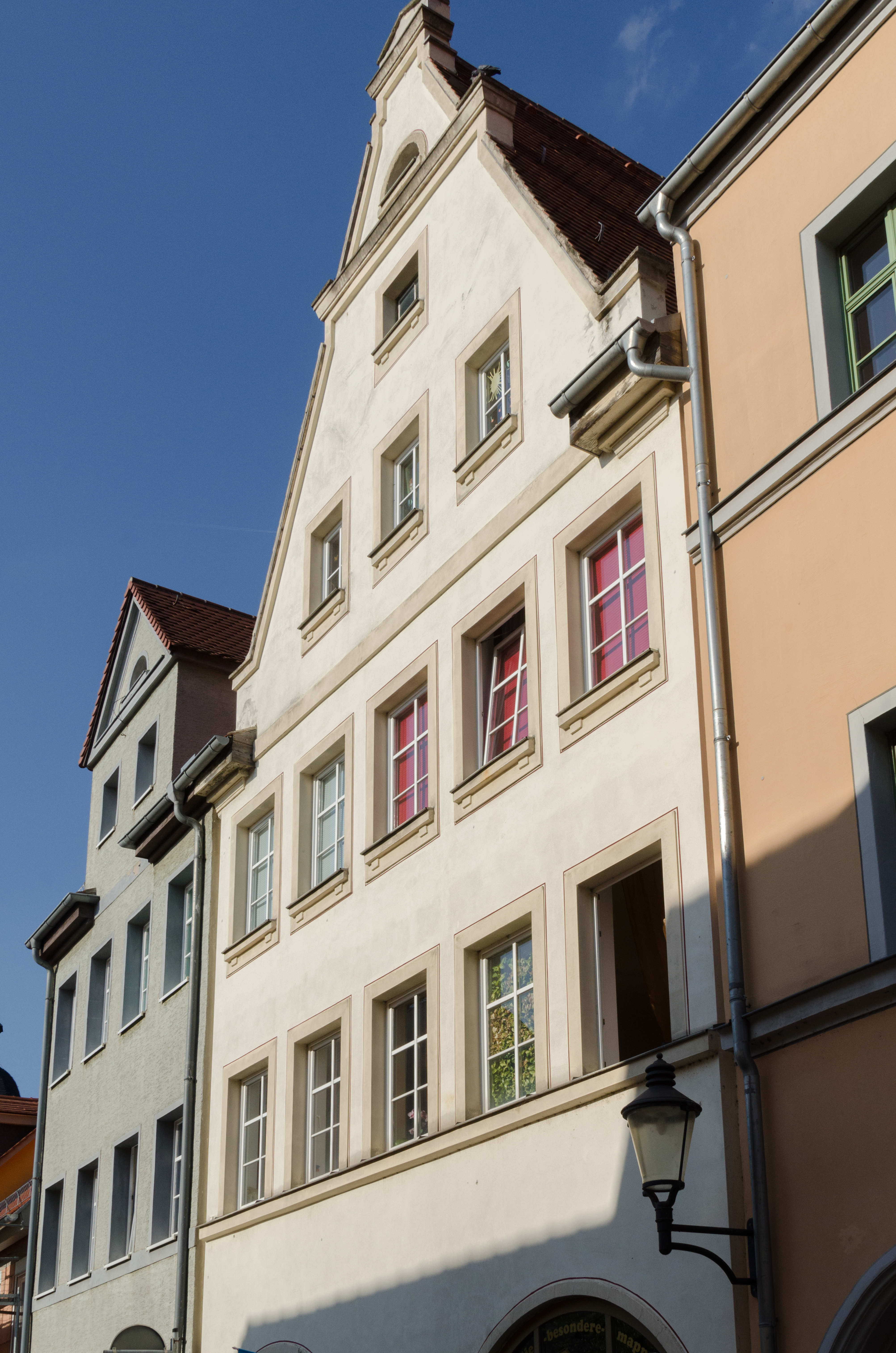 Naumburg, Marienstraße 16, Vorderhaus